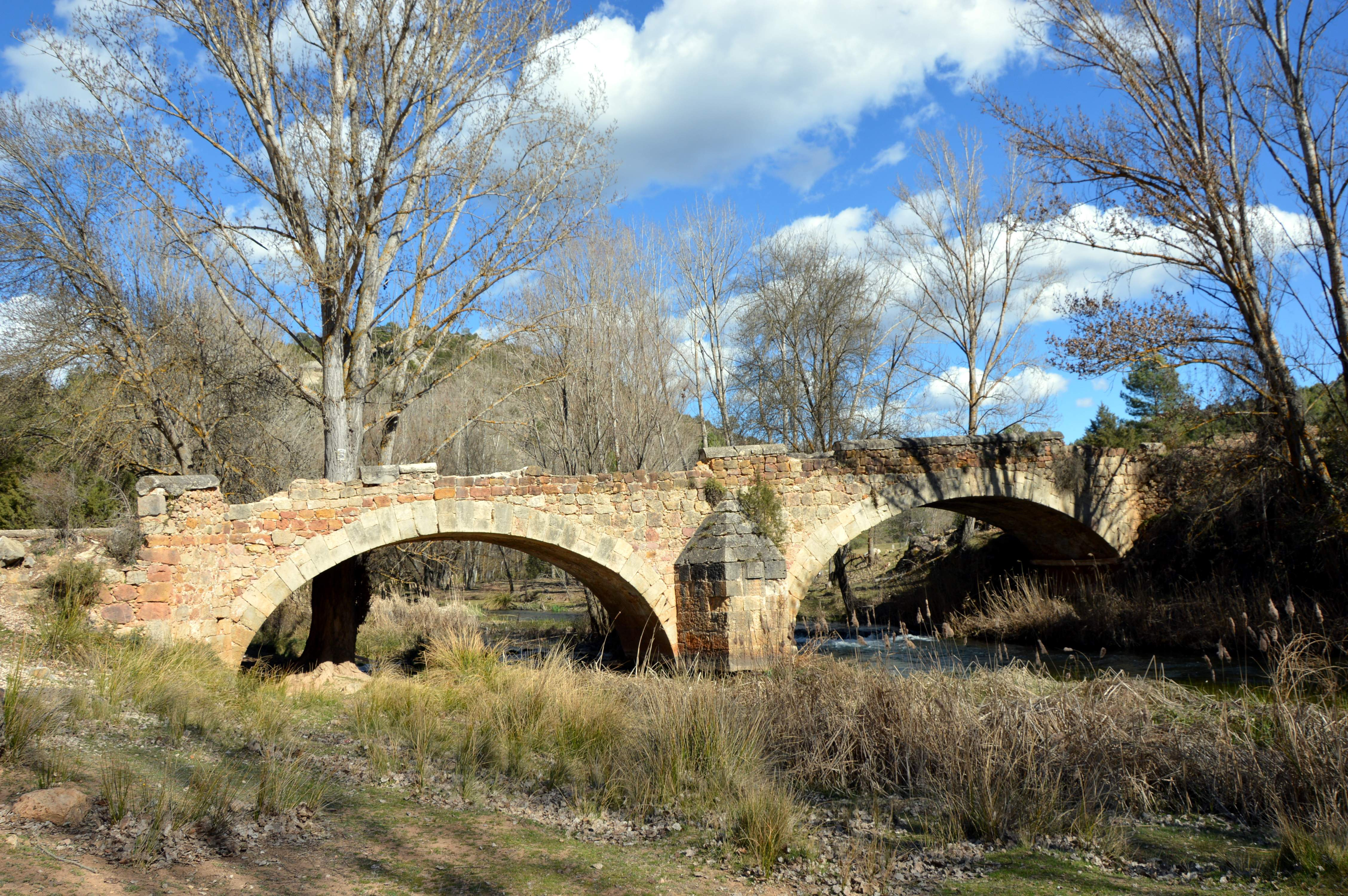 Vista general (occidental) del Puente de Cristinas en Pajaroncillo (Cuenca), 2017.